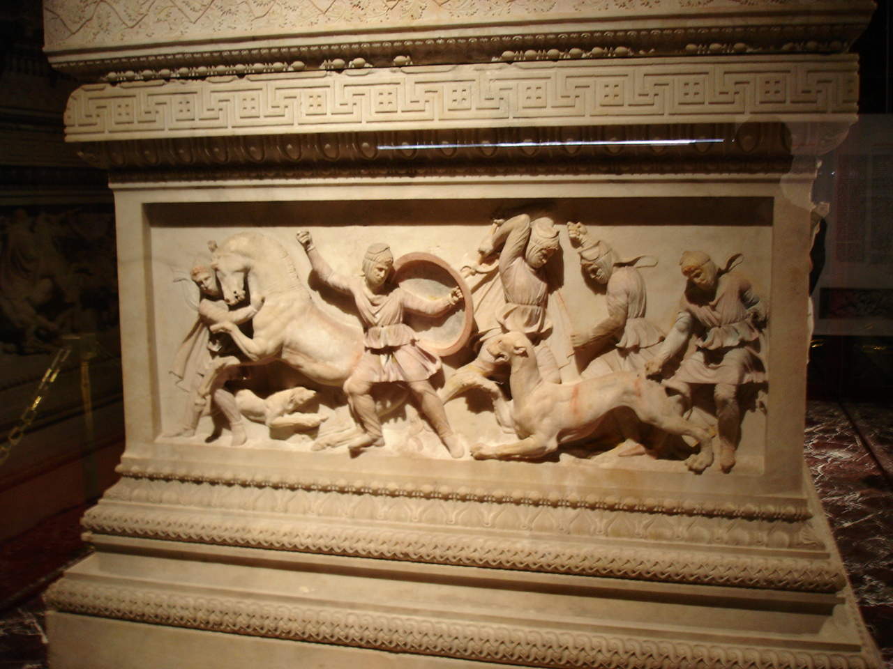 Istanbul - Museo archeologico - Sarcofago di Alessandro, sec. IV a.C. - Foto di: Giovanni Dall'Orto 28-5-2006. Scena di caccia.